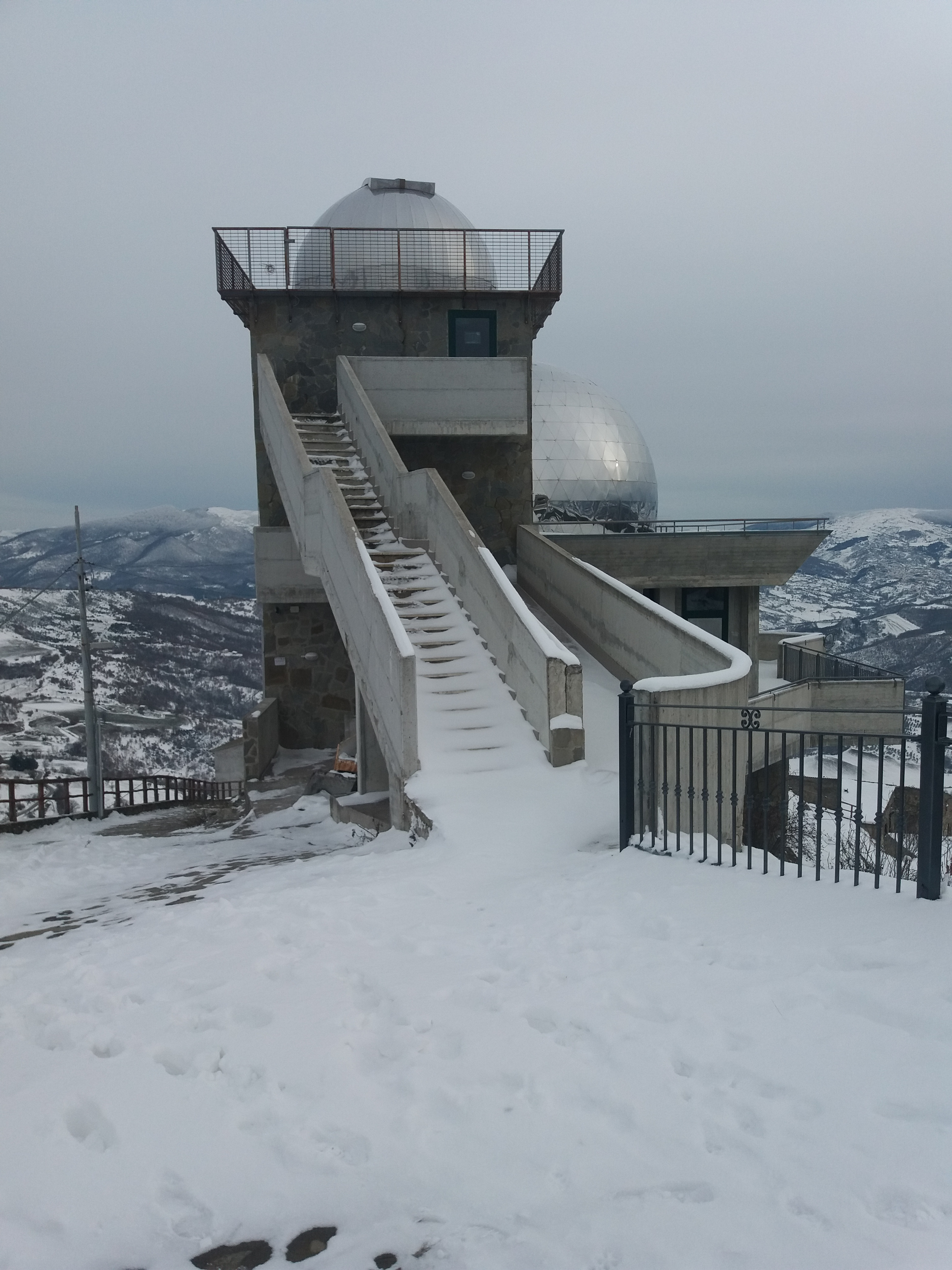 Questo è il Planetario Osservatorio Astronomico di Anzi (PZ) situato sul Monte Siri